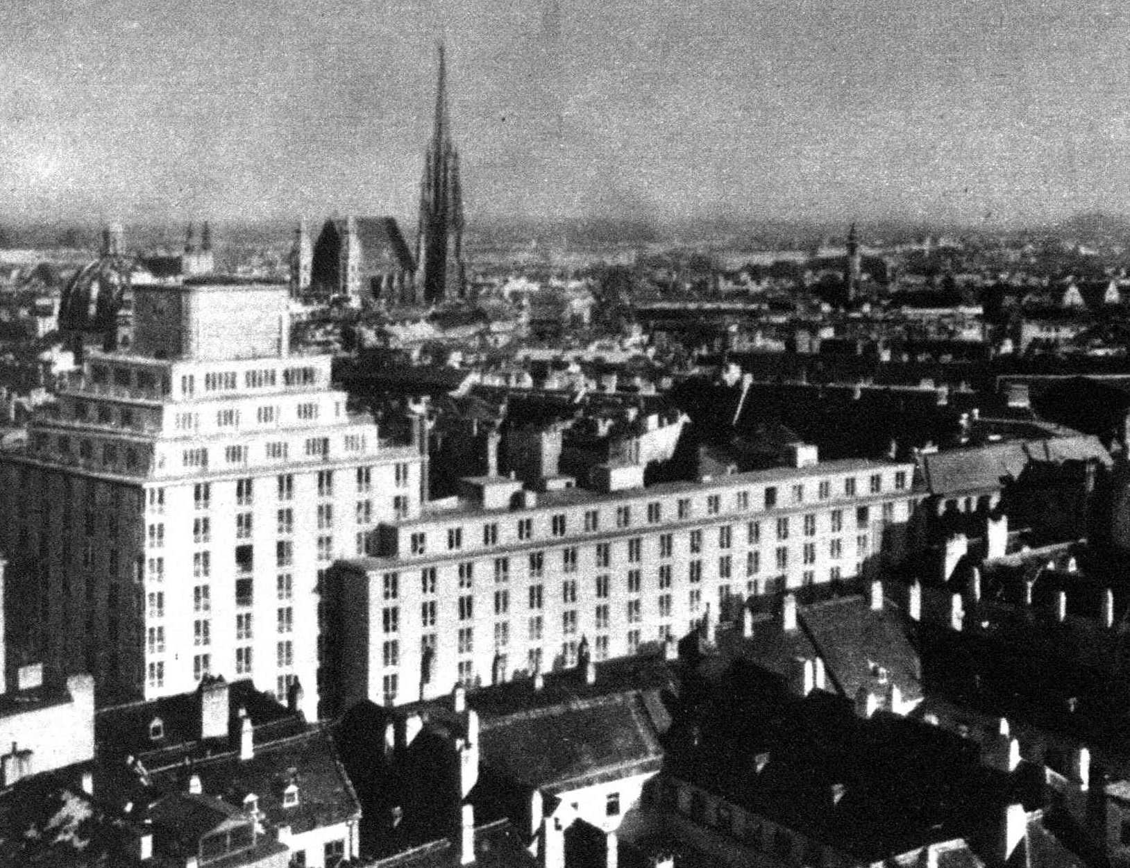 Hochhaus Herrengasse Aufnahme aus dem Jahr der Vollendung des Bauwerk 1932